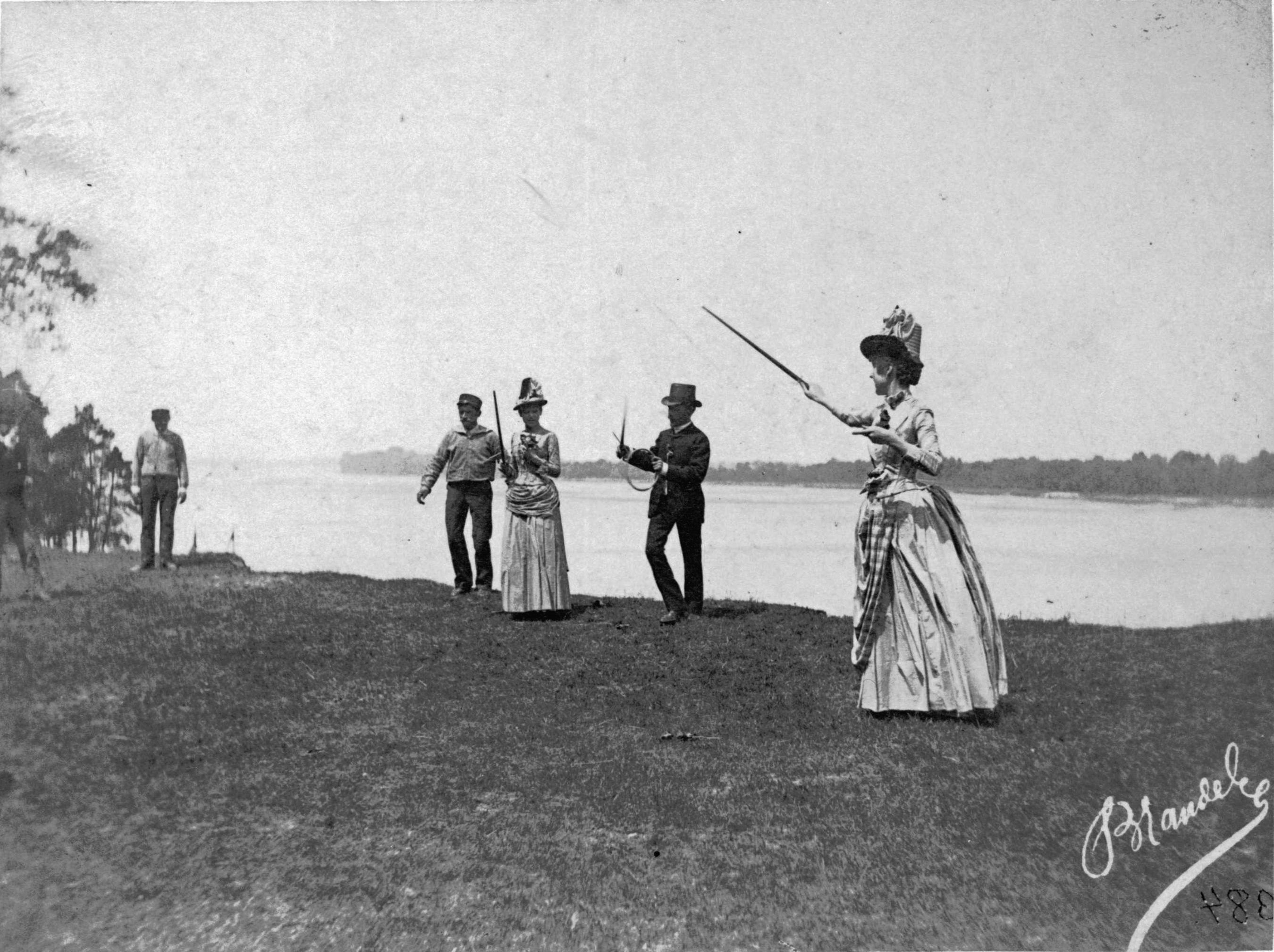 Gra w serso